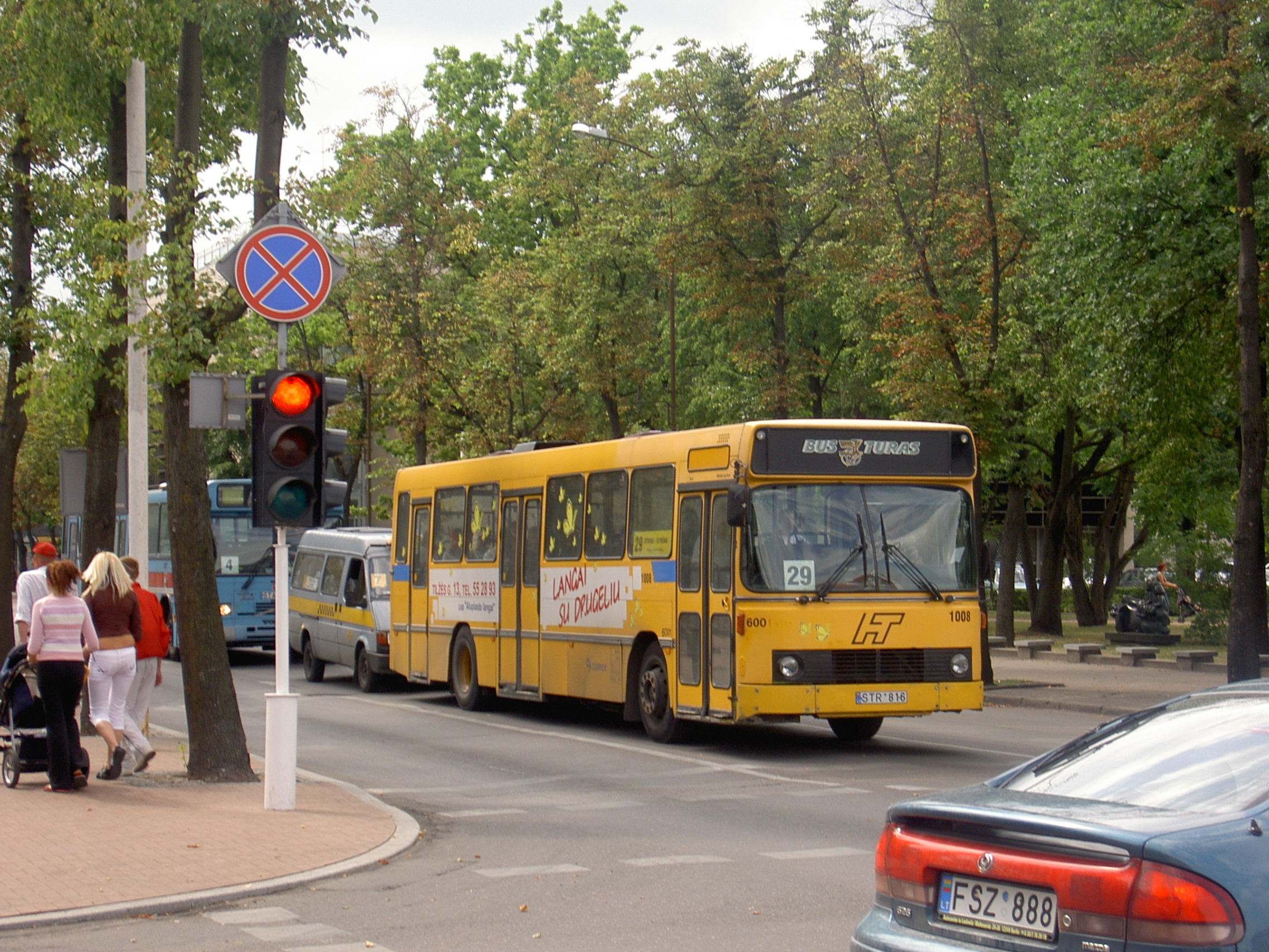 Autobusy v Šiauliai